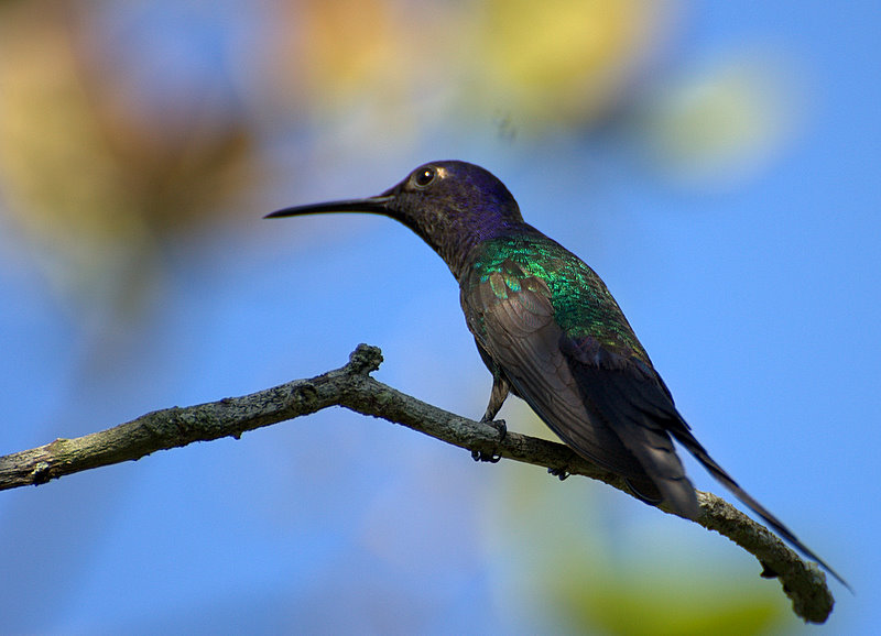 Eupetomena macroura in São Paulo, Brazil